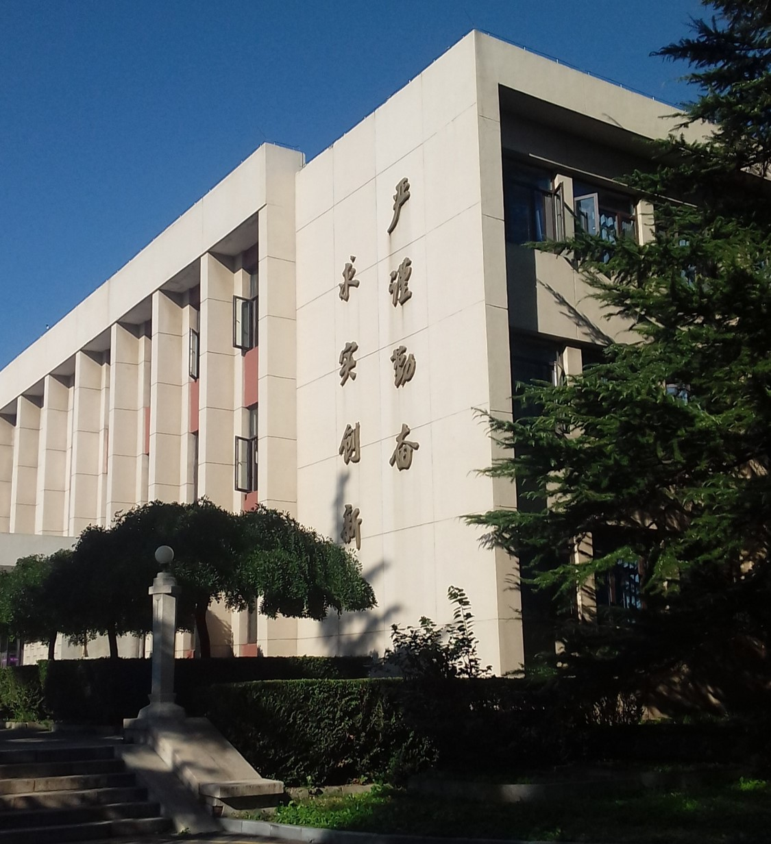 位於三教的學風